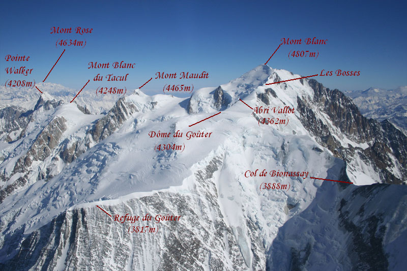 Photo aérienne du Mont Blanc Auteur : Ceky Photo présentée et commentée sur Trekearth